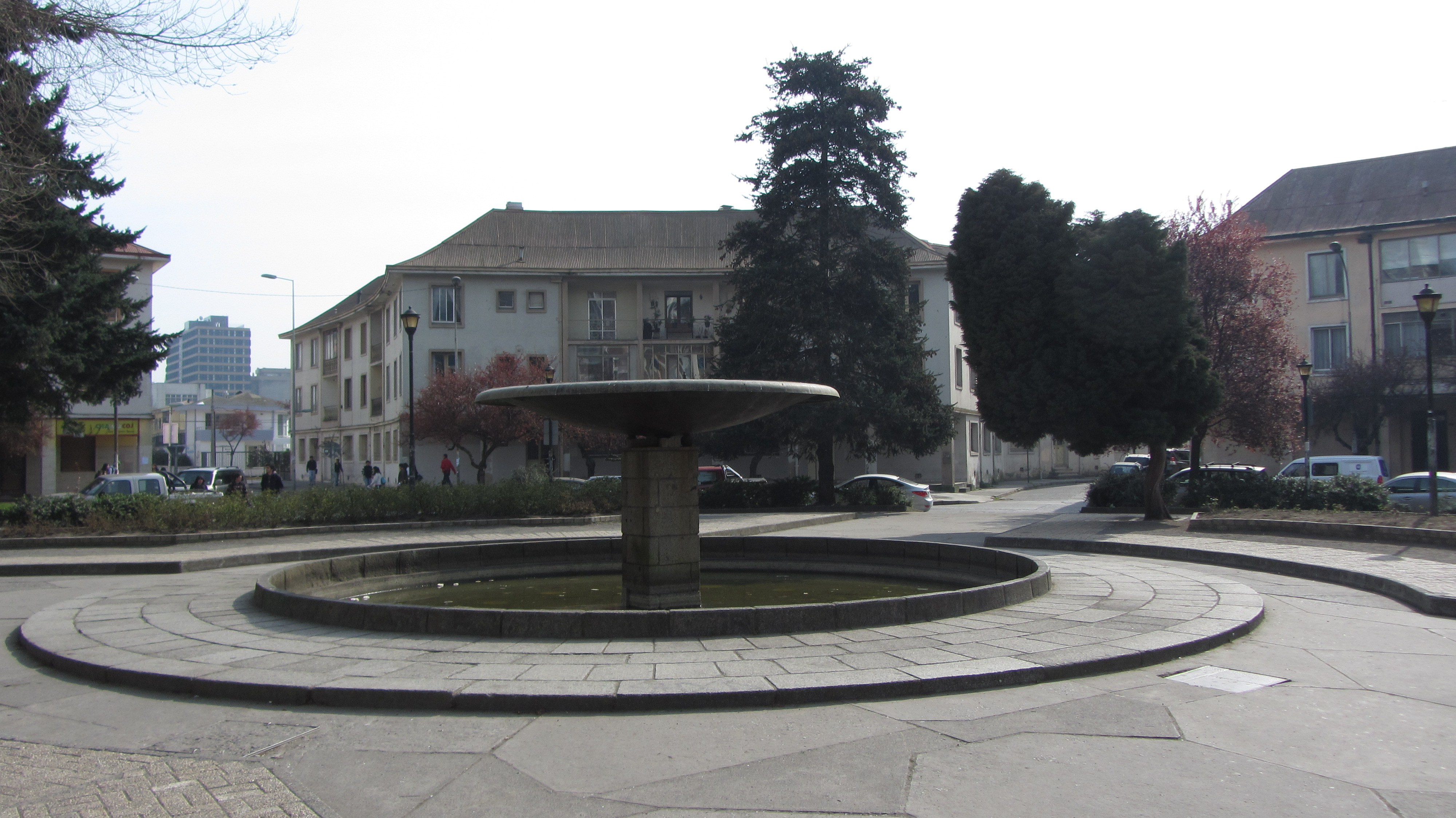 Plaza Perú Concepción, Chile Septiembre de 2012